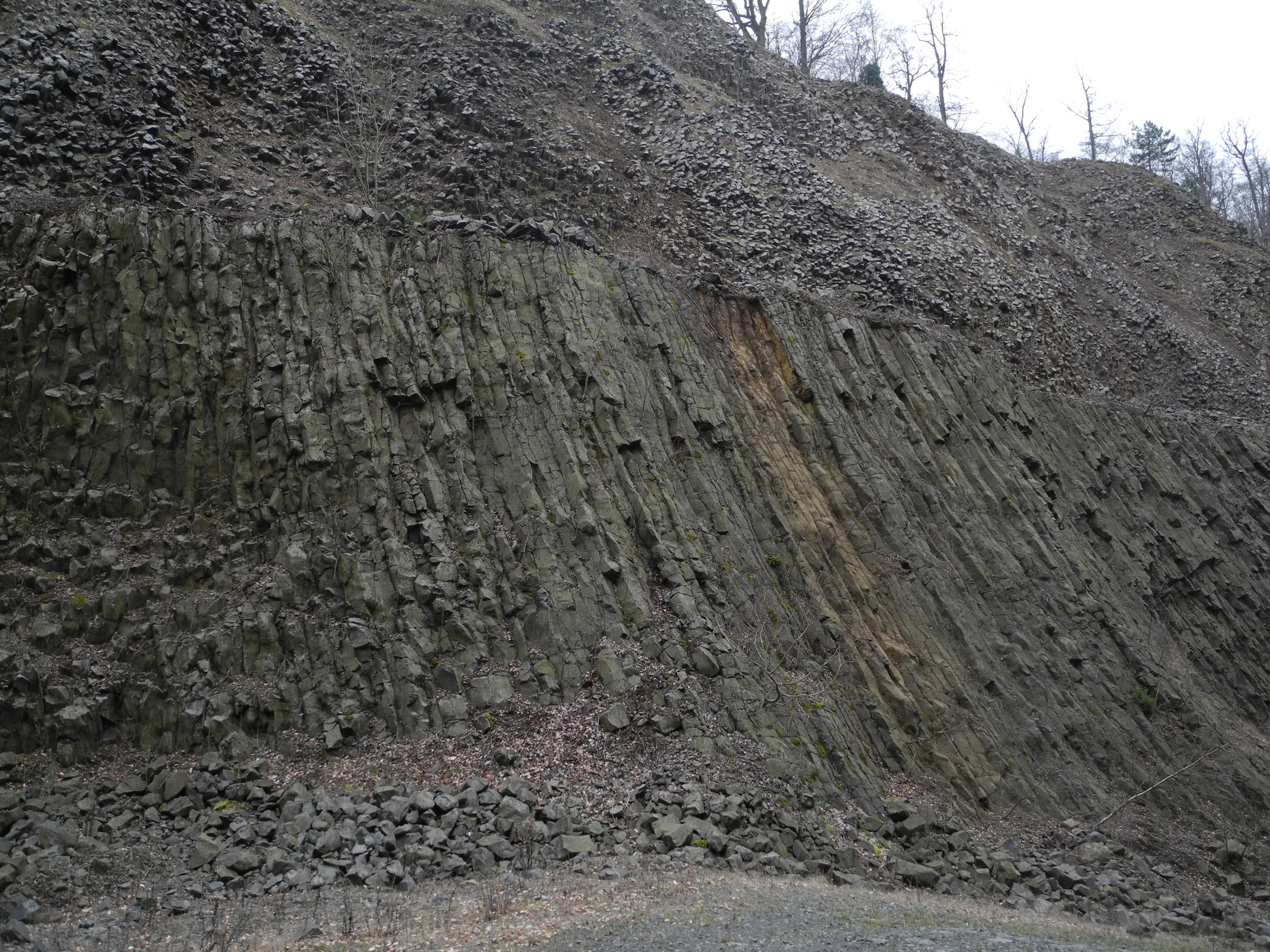 7000 Eichen - Die Stelen. Der Steinbruch Landsburg bei Schlierbach in der Schwalm.